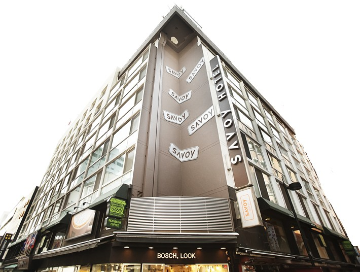 호텔(2016.05.02)